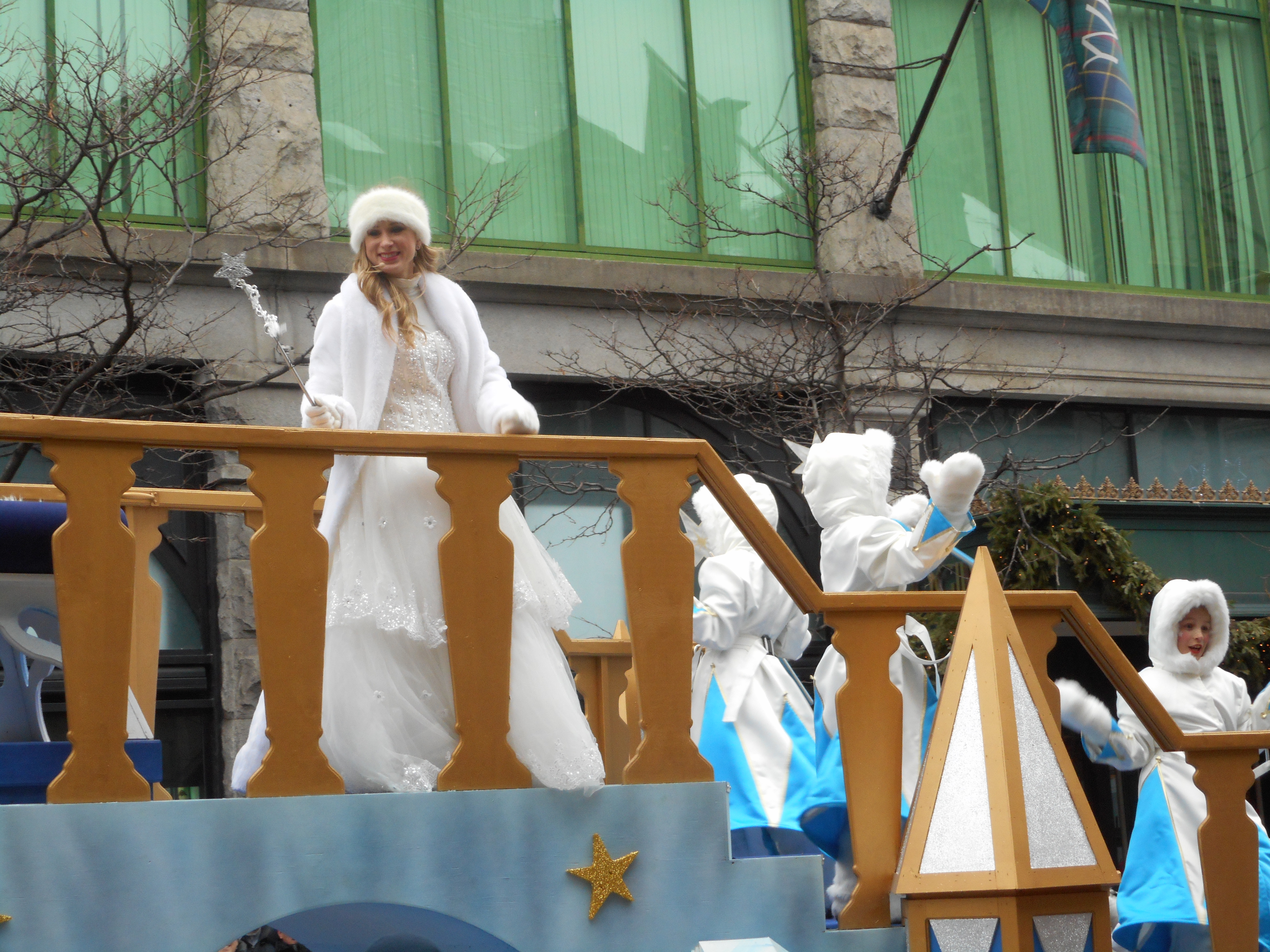 Défilé du Père Noël, rue Sainte-Catherine Ouest, Montréal Joannie Rochette est la Fée des étoiles